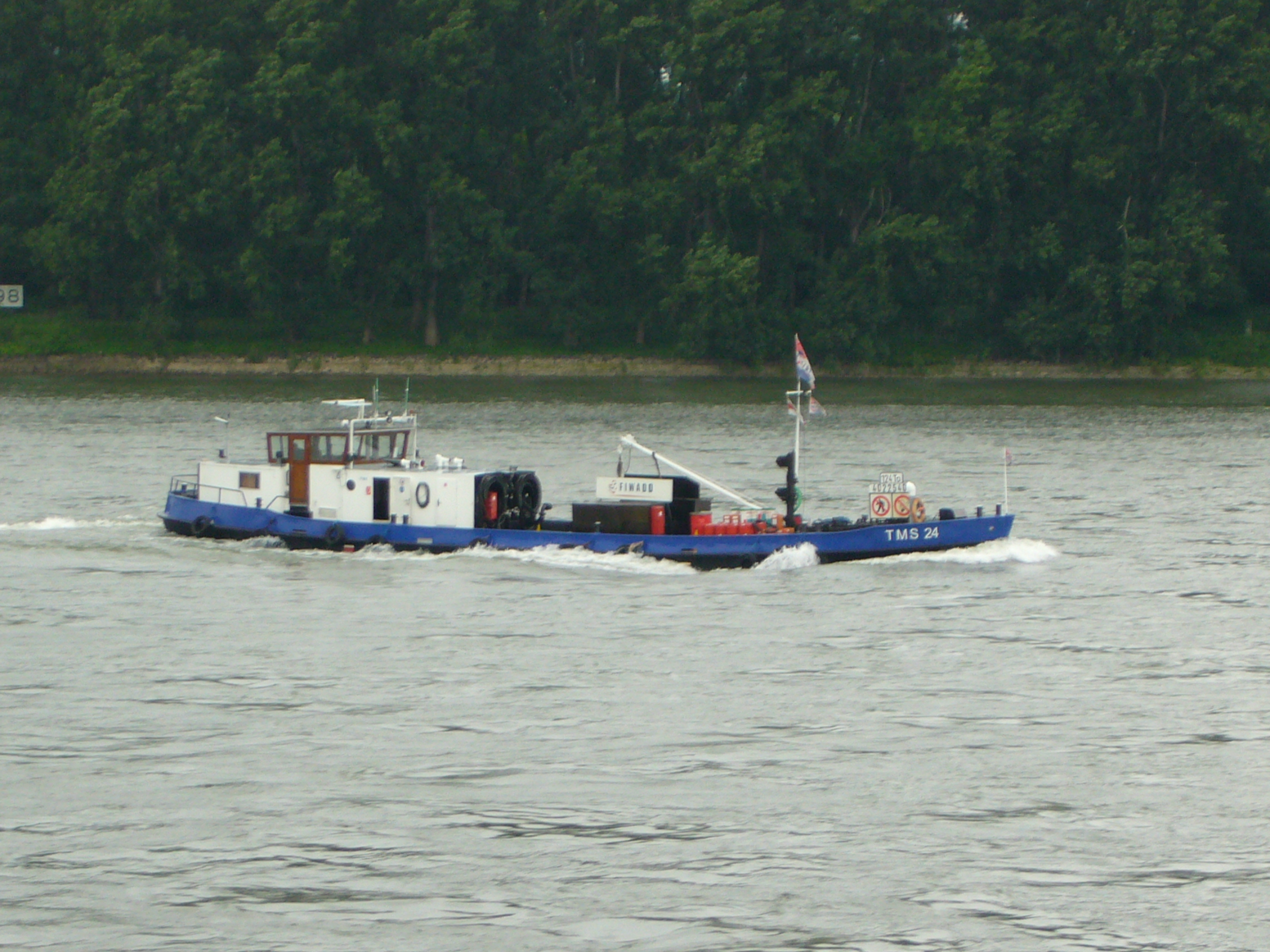 Bunkerboot TMS 24, voorheen Shell 24 ENI Nummer: 04022540 Bouwjaar: 1953 Werf van aanbouw: Scheel & Johnke in Hamburg, Duitsland Lengte: 27,85 m Breedte: 5,56 m Diepgang: 1,85 m Laadvermogen: 124 ton Voortstuwing: Deutz 267 pk